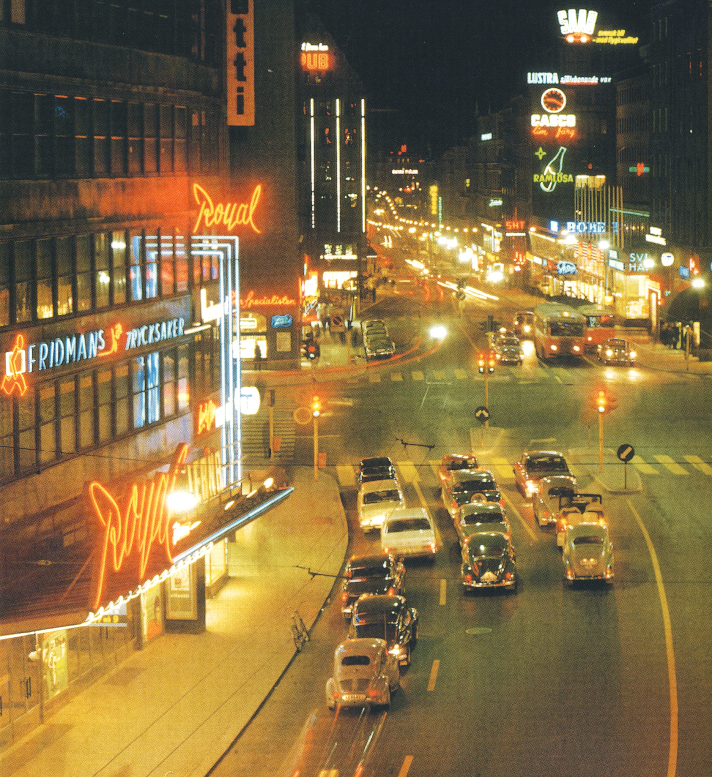 Biografen "Royal" vid Kungsgatan i Stockholm, vy mot väst och korsningen med Sveavägen.